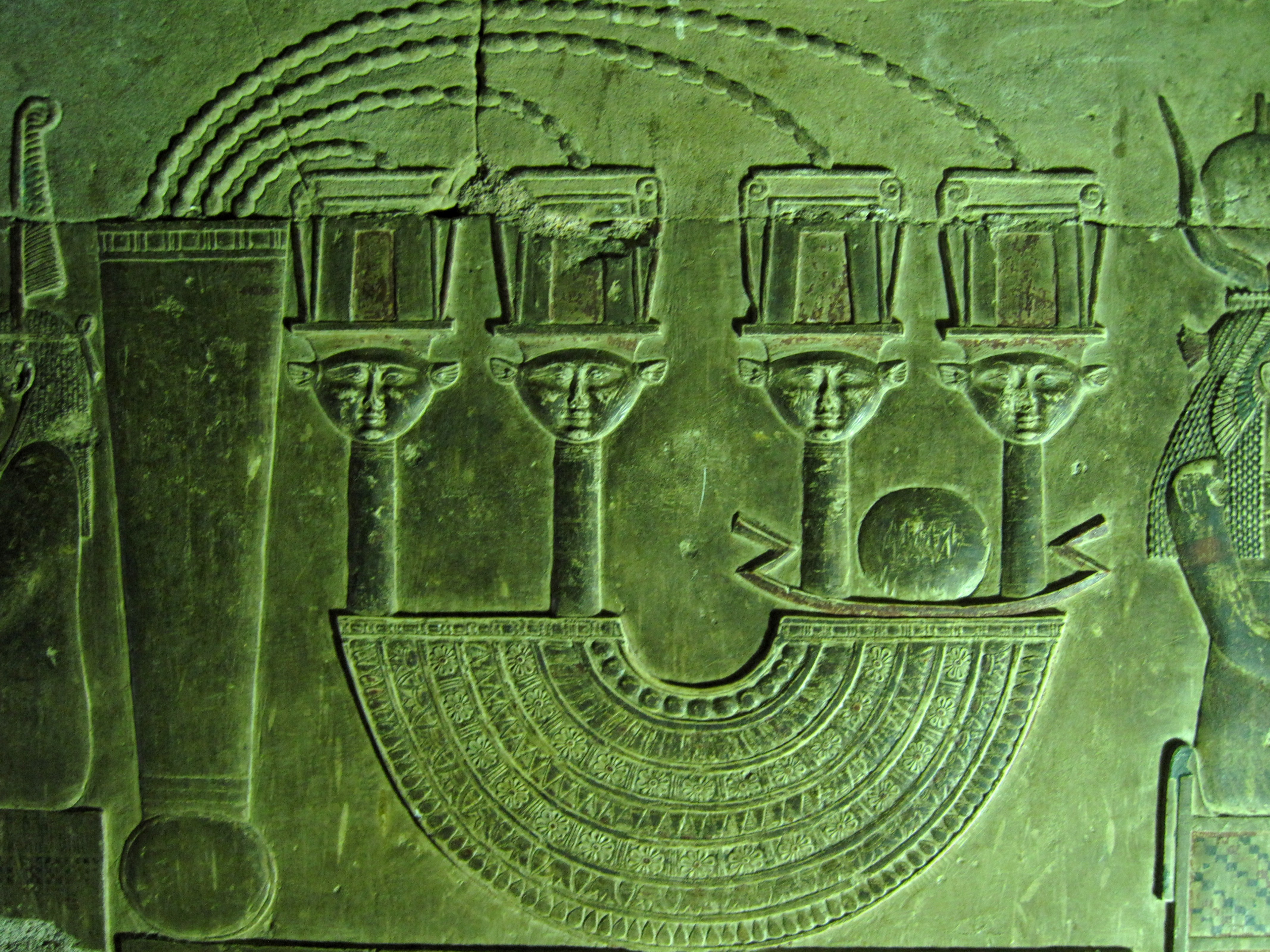 Relief in der Krypta des Tempels von Dendera, Ägypten